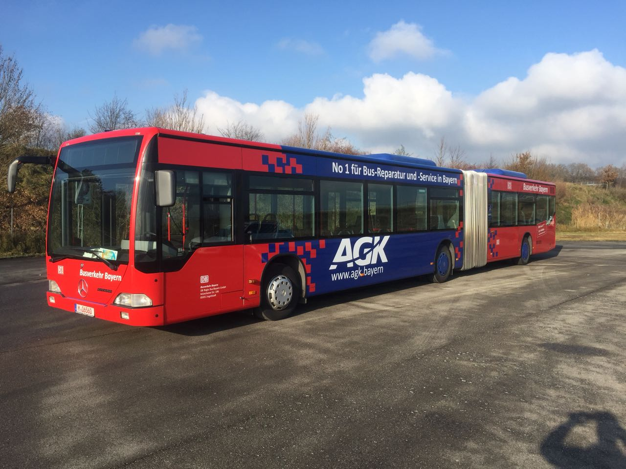 DRB Bus Citaro G mit Werbung AGK